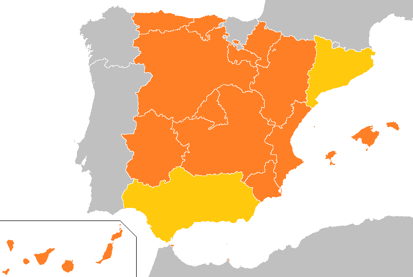 CC.AA. que celebraron elecciones en mayo de 2015 Otras CC.AA. que celebraron elecciones en 2015